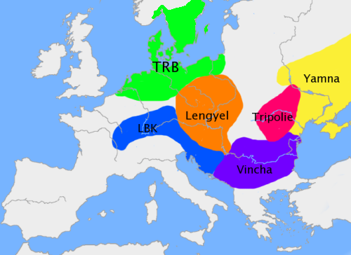 Modifierad utbredning av TRB